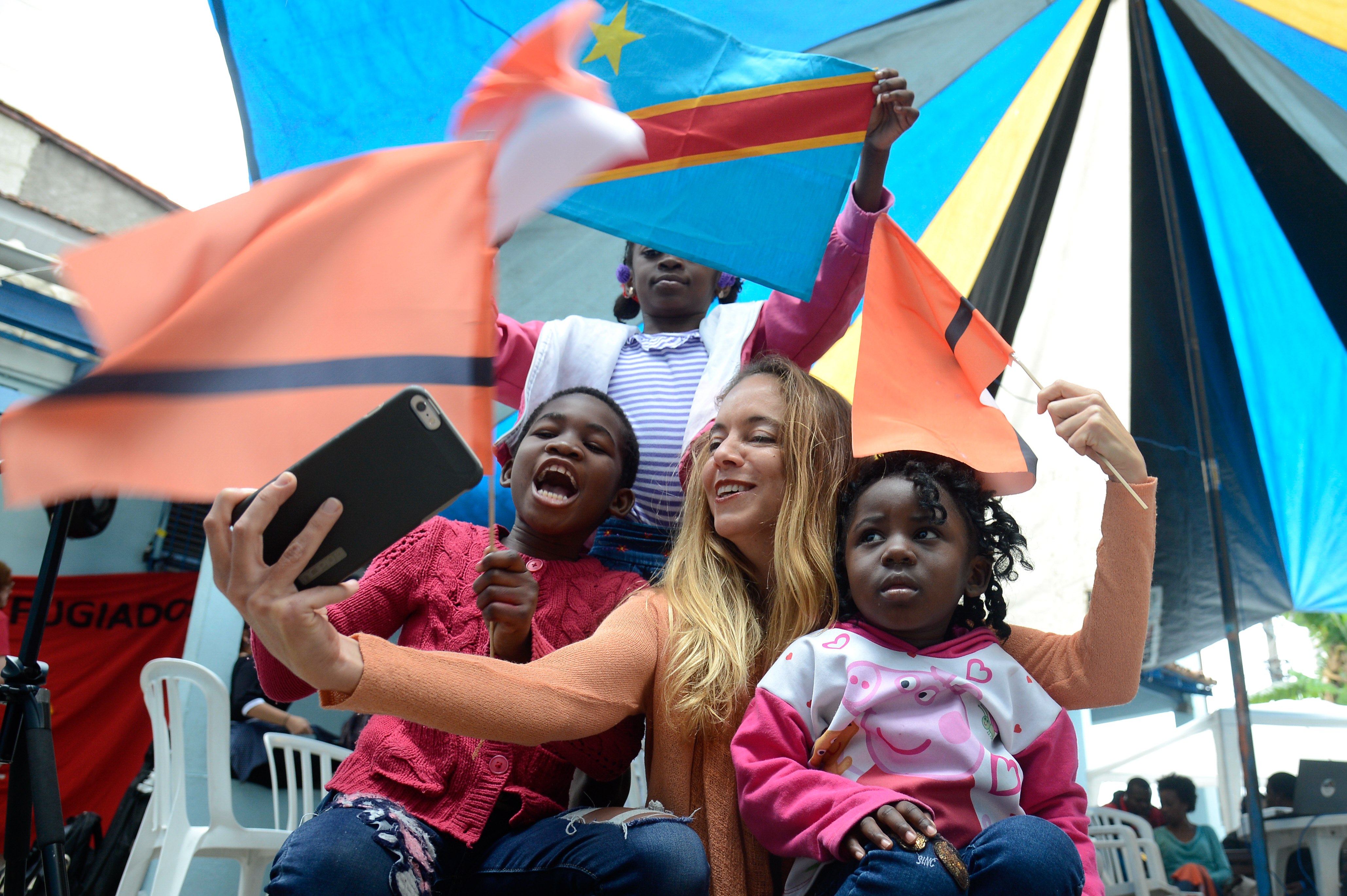 Rio de Janeiro - Refugiados do Congo e de outras nacionalidades que vivem no Rio se unem na torcida pela equipe de judocas de refugiados, na sede da Cáritas (Tânia Rêgo/Agência Brasil)